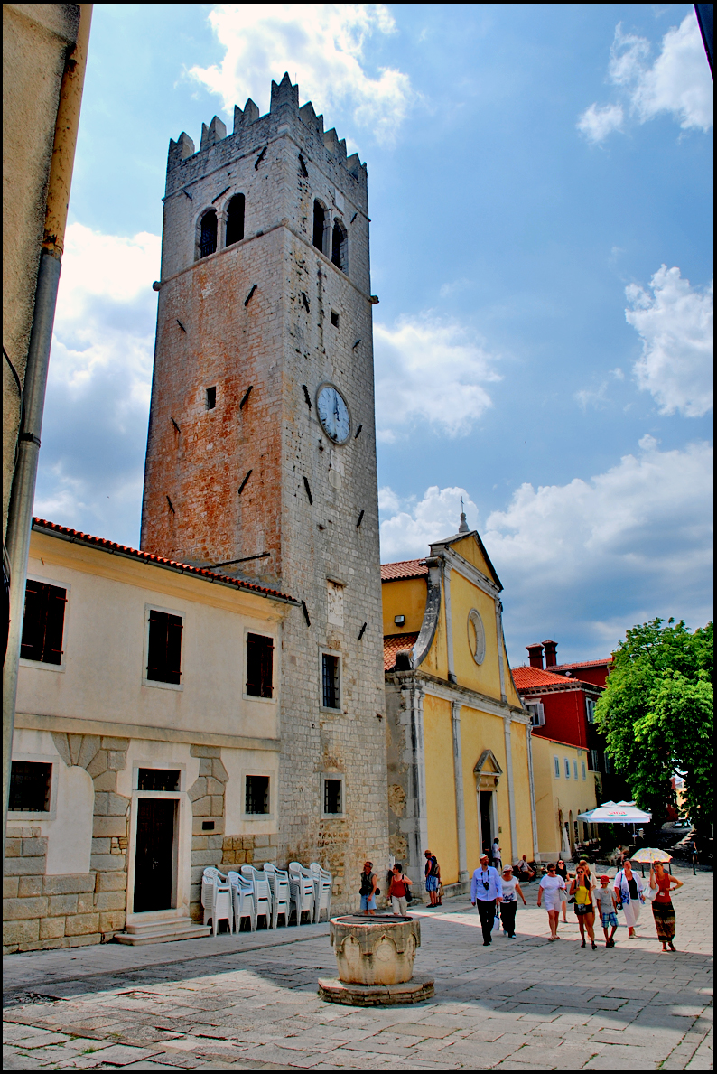 Мотовун/Motovun